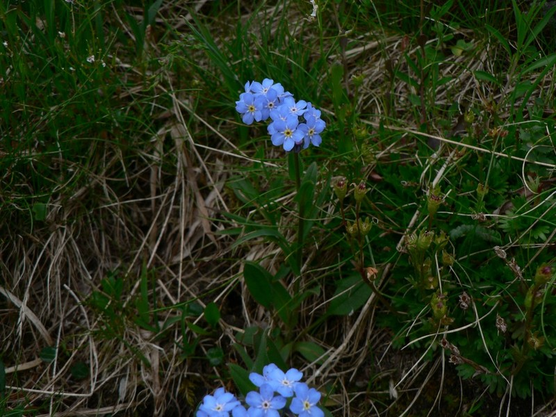 Pomněnka alpská v Liliovém sedle, Vysoké Tatry.